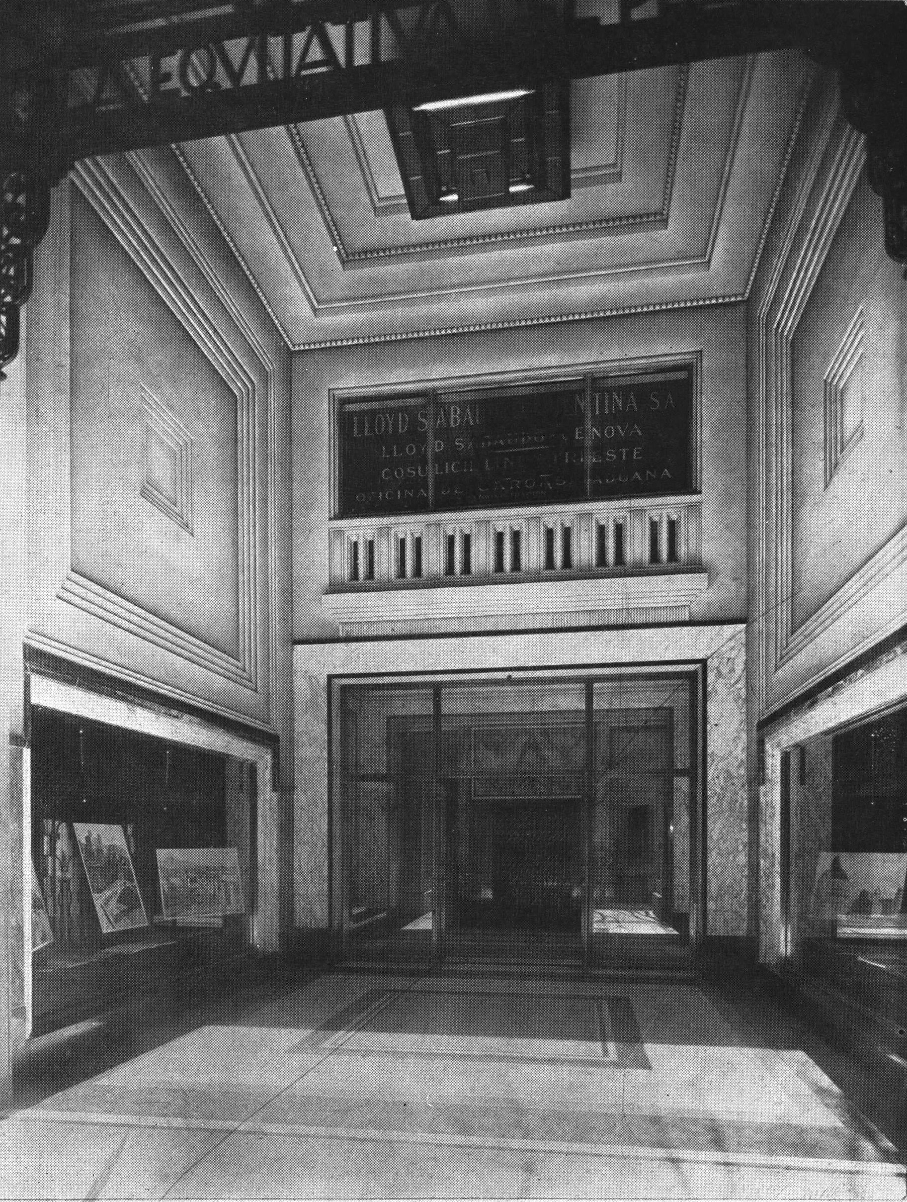 Hall de entrada del edificio de la compañía de seguros La Equitativa del Plata. Fue proyectado por Alejandro Virasoro en 1927, y es uno de los mejores ejemplos de arquitectura art déco de la ciudad. Está en la esquina sudeste de Diagonal Norte y Florida. Barrio de San Nicolás, ciudad de Buenos Aires, Argentina.